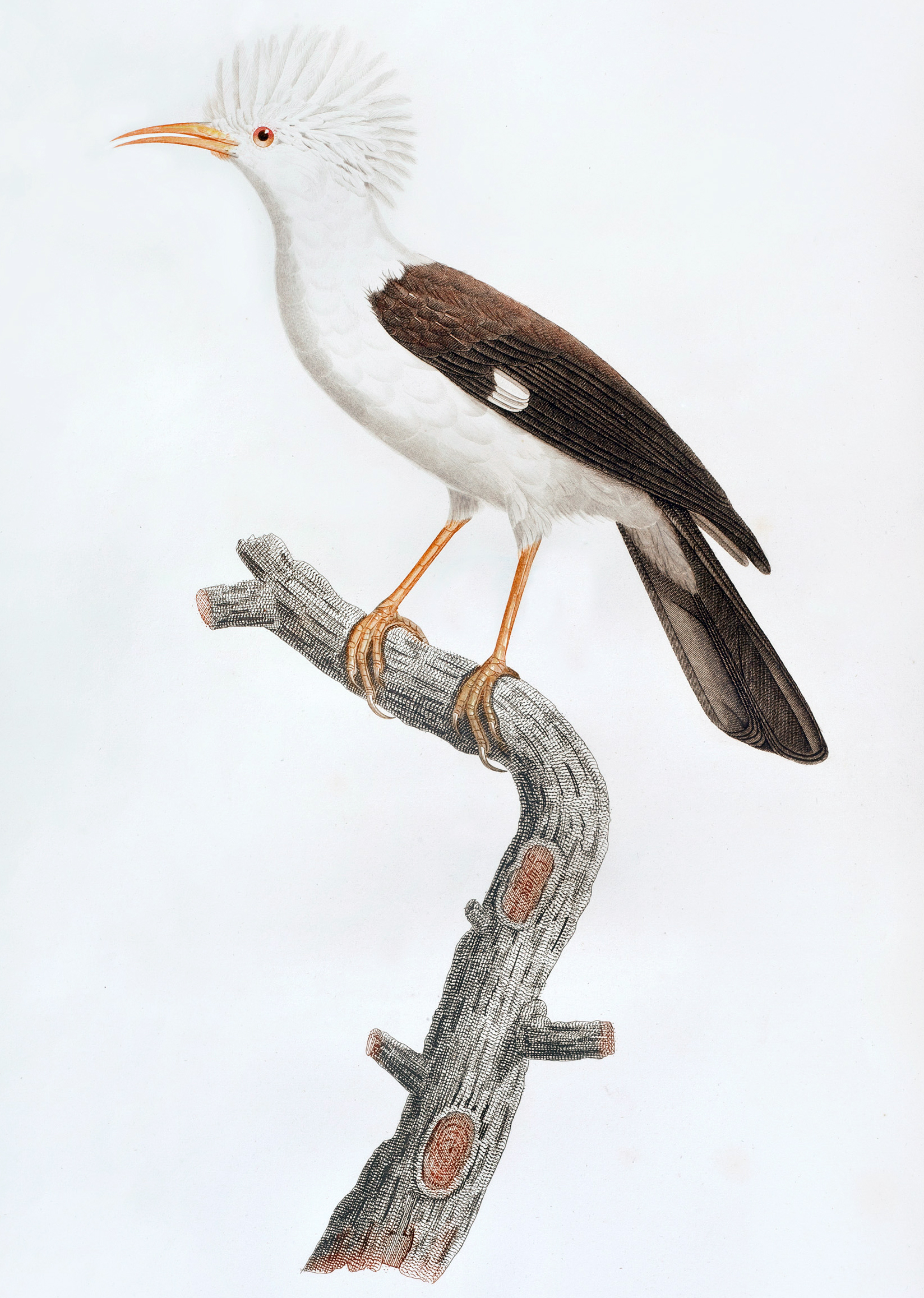 Hoopoe starling. Le Mérops Huppé.